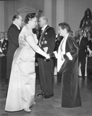 Tasavallan Presidentti Urho Kekkonen ja rouva Sylvi Kekkonen toivottavat pääjohtaja Karl-August Fagerholmin ja rouva Judith Fagerholmin tervetulleeksi itsenäisyyspäivänvastaanotolle.